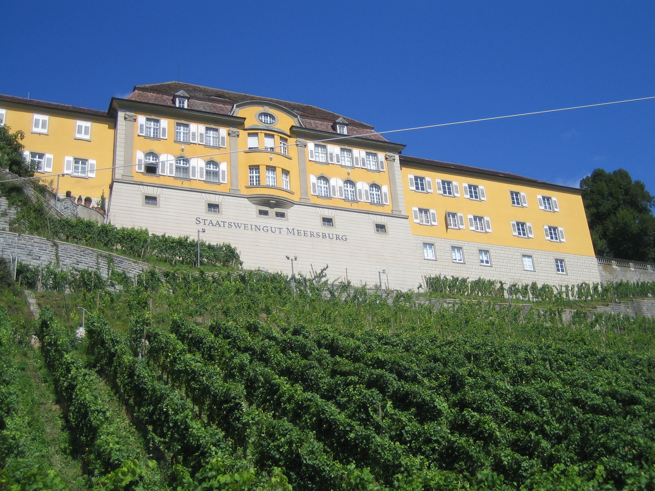 Staatsweingut Meersburg Koordinaten: 47.692887,9.273515